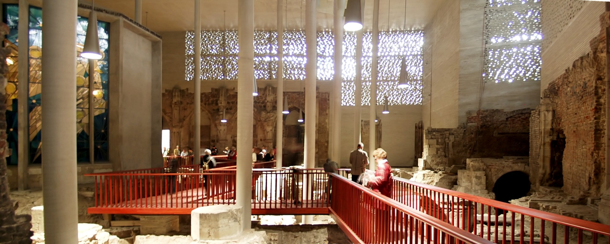 Ausgrabungen/Fundamente von St. Kolumba im Diözesanmuseum Kolumba